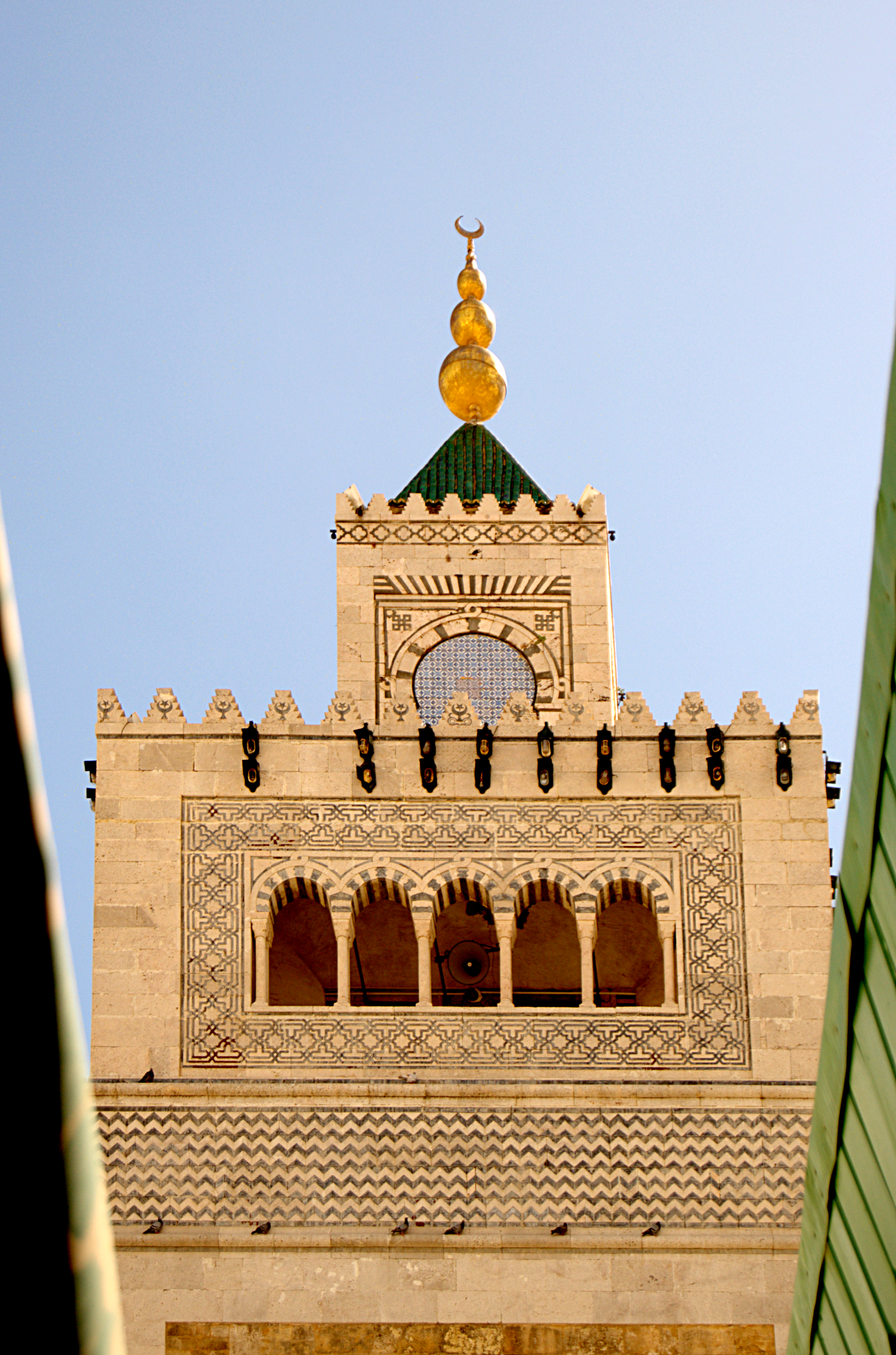 Grande Mosquée (Djamaa Zitouna), Tunis